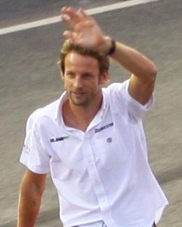 Jenson Button at Singapore GP Parade Lap